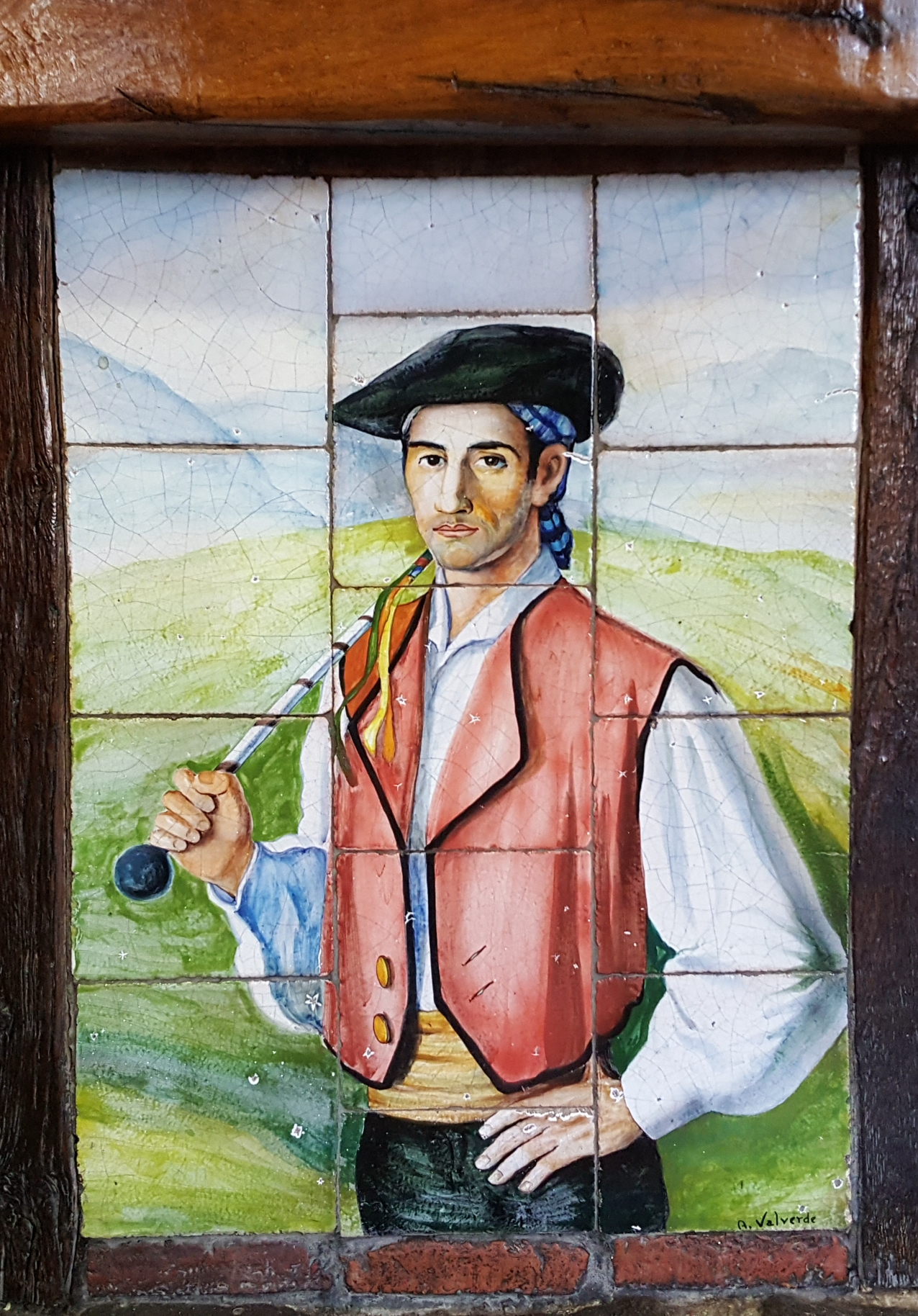 Iztueta dantzari gaztearen irudia Zaldibian